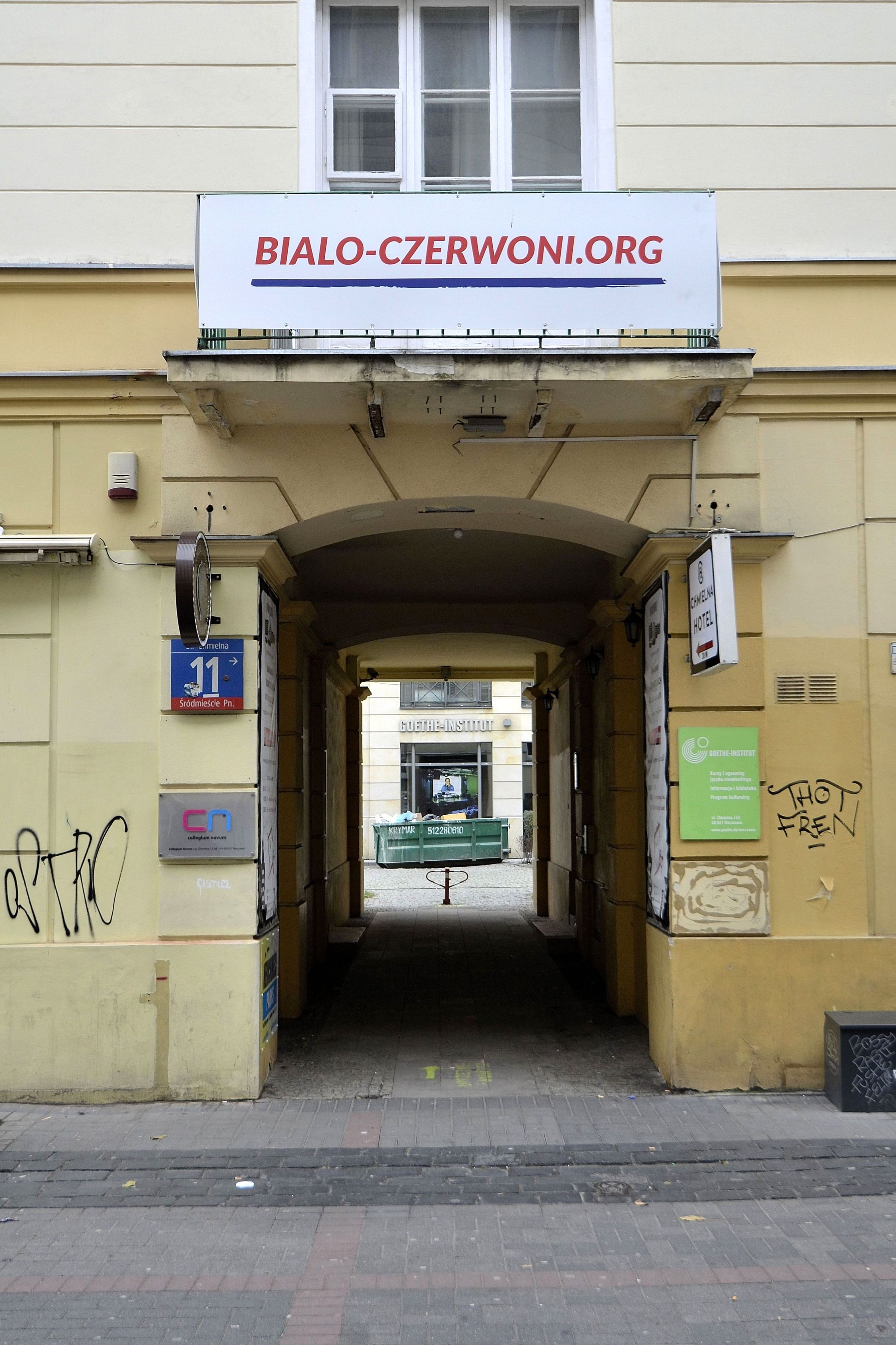 Ulica Chmielna 11 w Warszawie